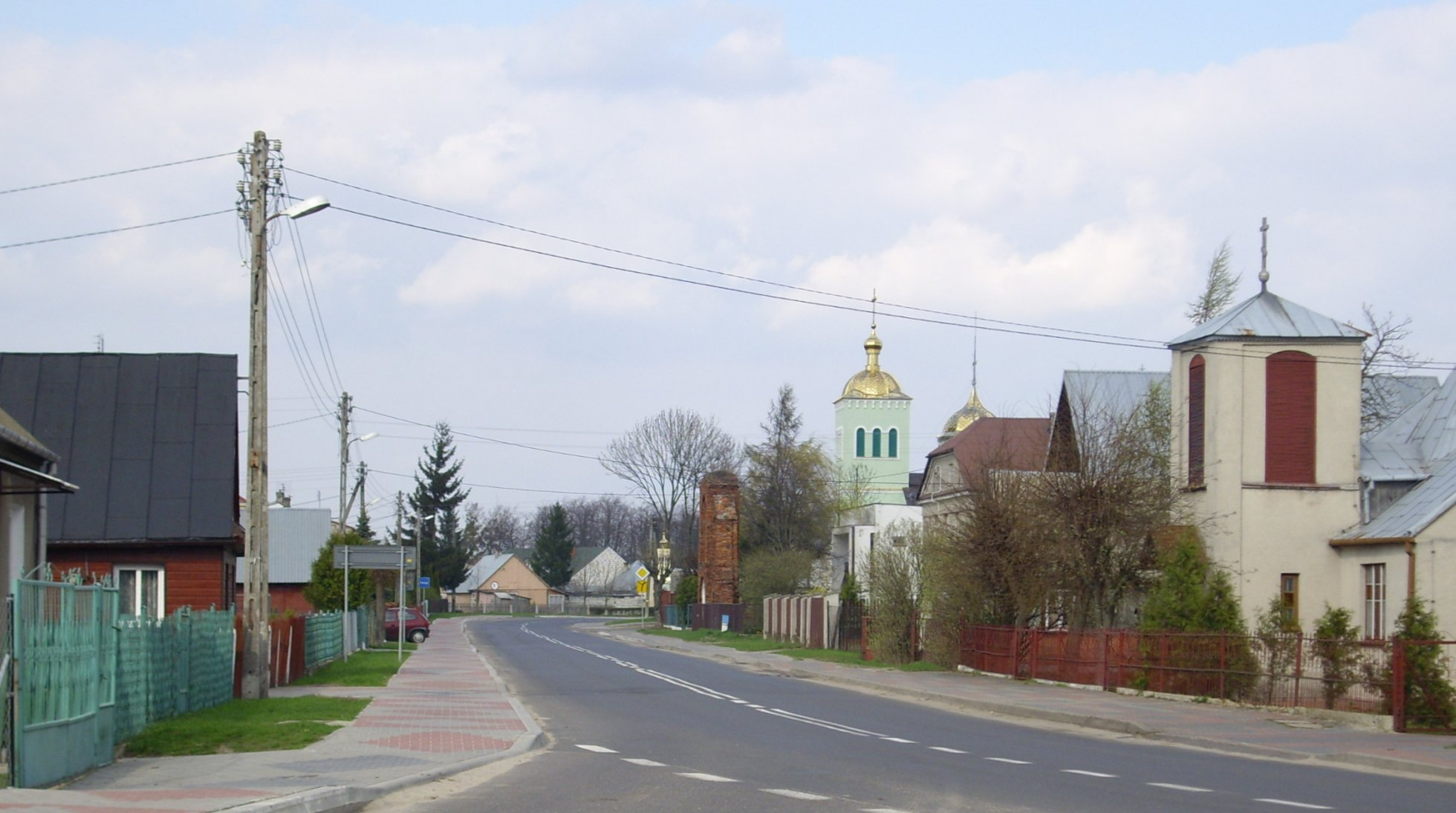 Kodeń. Ulica Sławatycka.